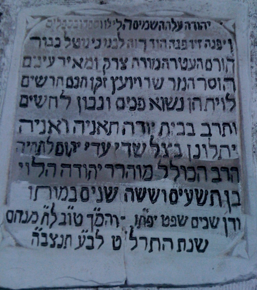 Rabi Yehuda Halevi Of Ragusa - Grave's Headstone